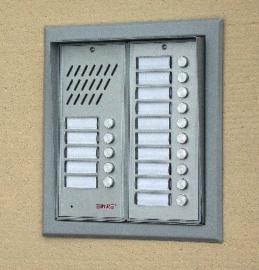 kaseta bramowa domofony 4lx -15nr